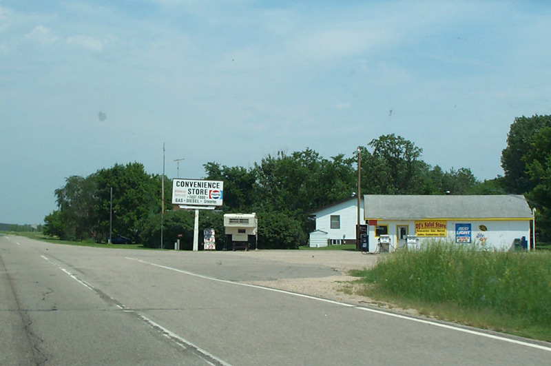 Salol, Minnesota